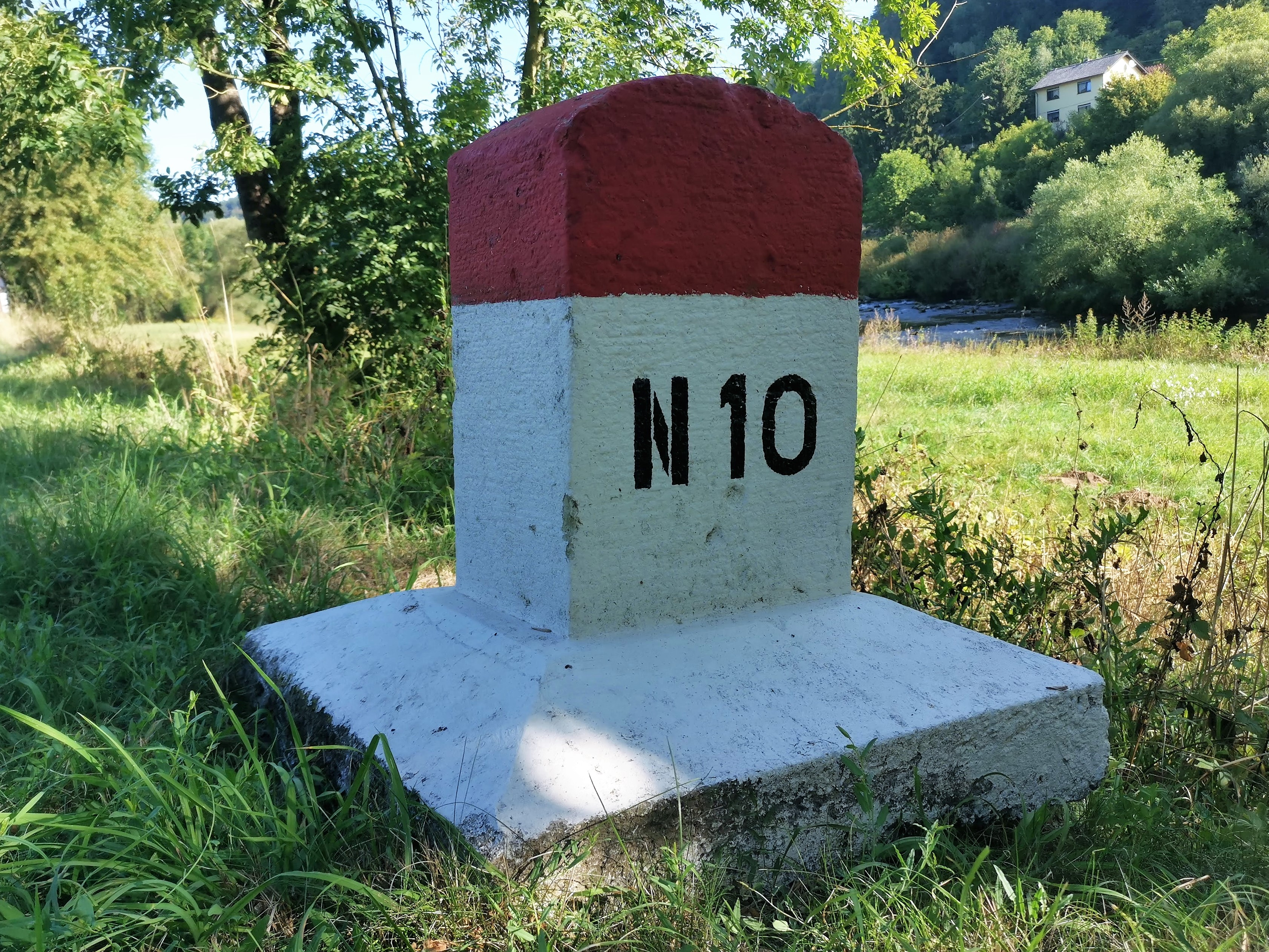 Borne kilométrique sur la N10 à Wallendorf-Pont.